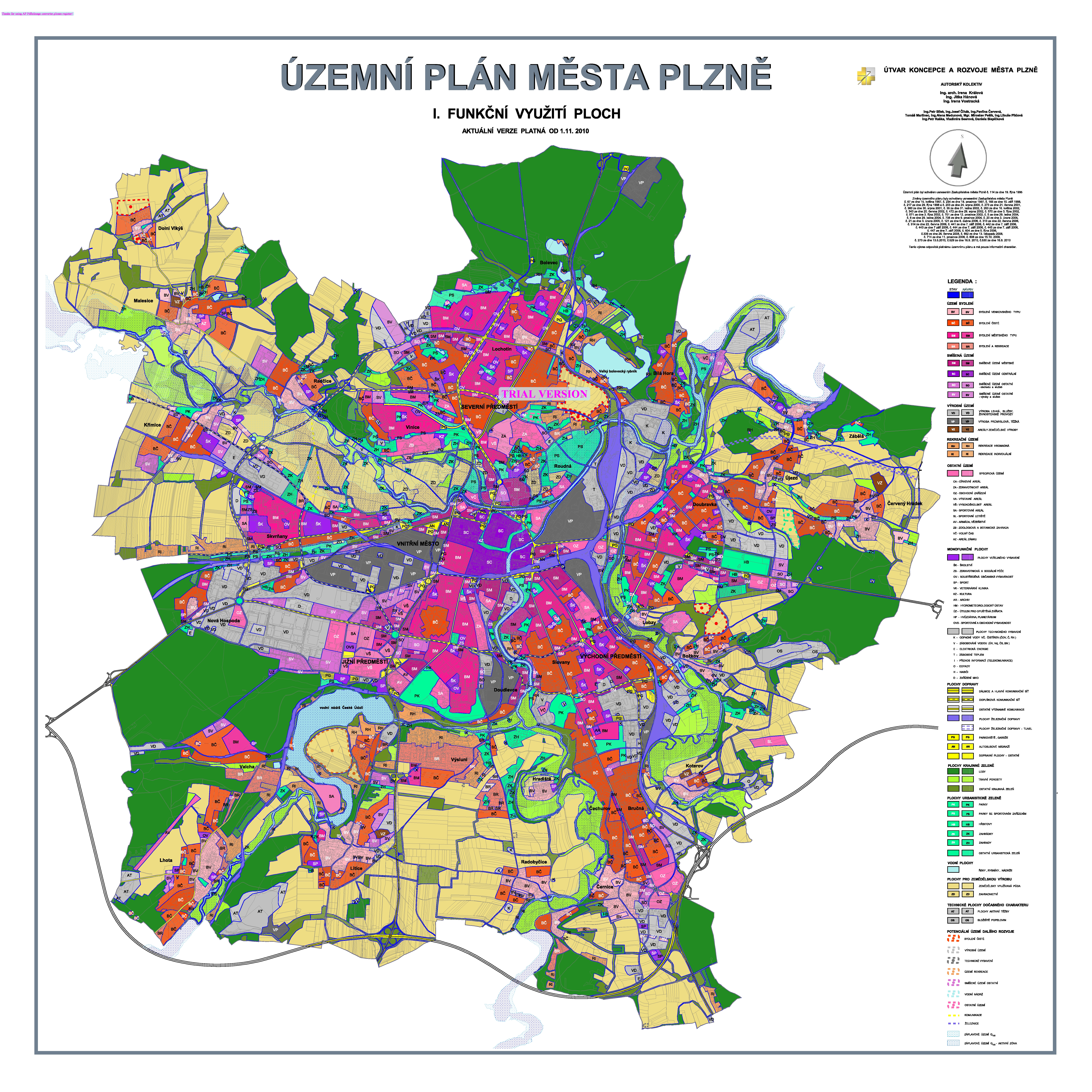 Česky: Územní plán města Plzně, 2010